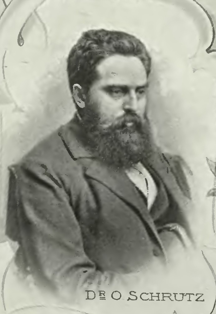 Portrét – Ondřej Schrutz (1865-1932), Český lékař, epidemiolog.